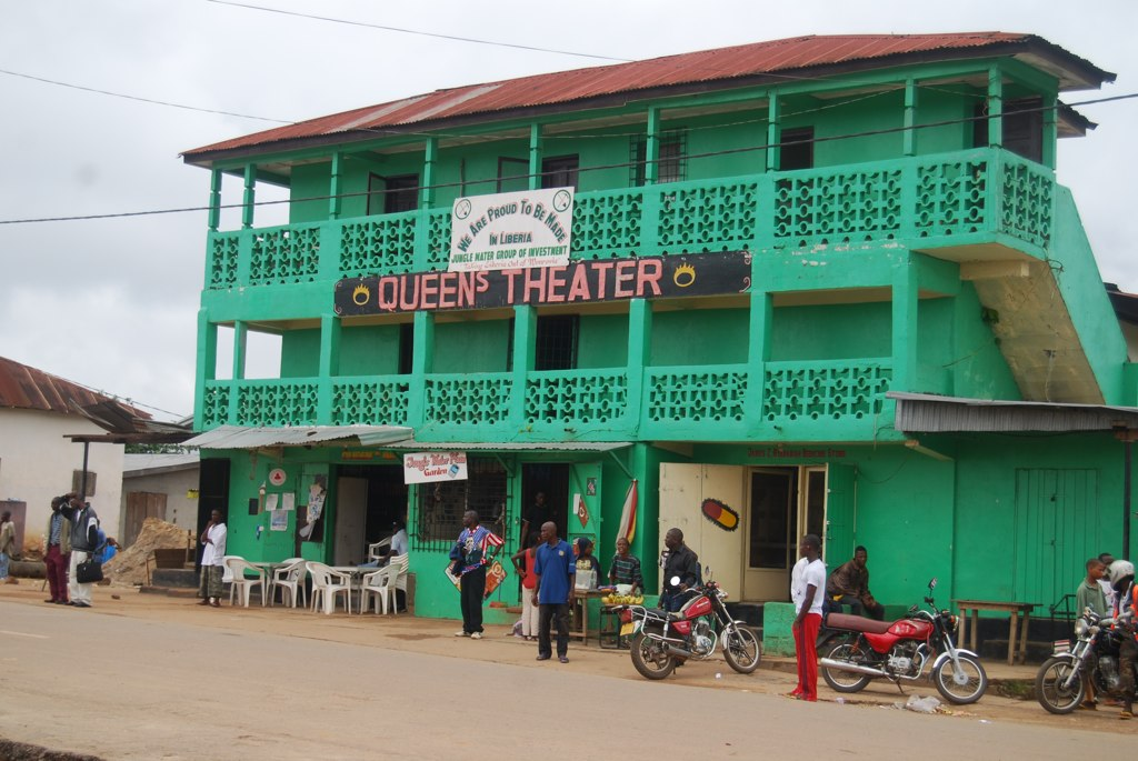 Queen's Theatre - Sanniquellie - Liberia - 2011